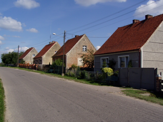 Domy przy drodze do Bukowca - Stary Dwór - g. Trzciel - woj. lubuskie - Poland